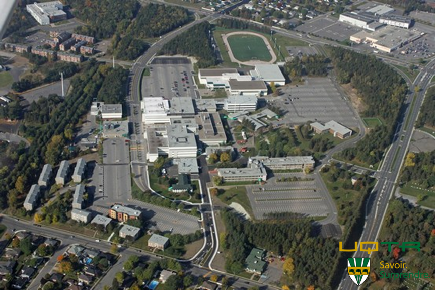 Vue aérienne d'une partie du campus UQTR 2011